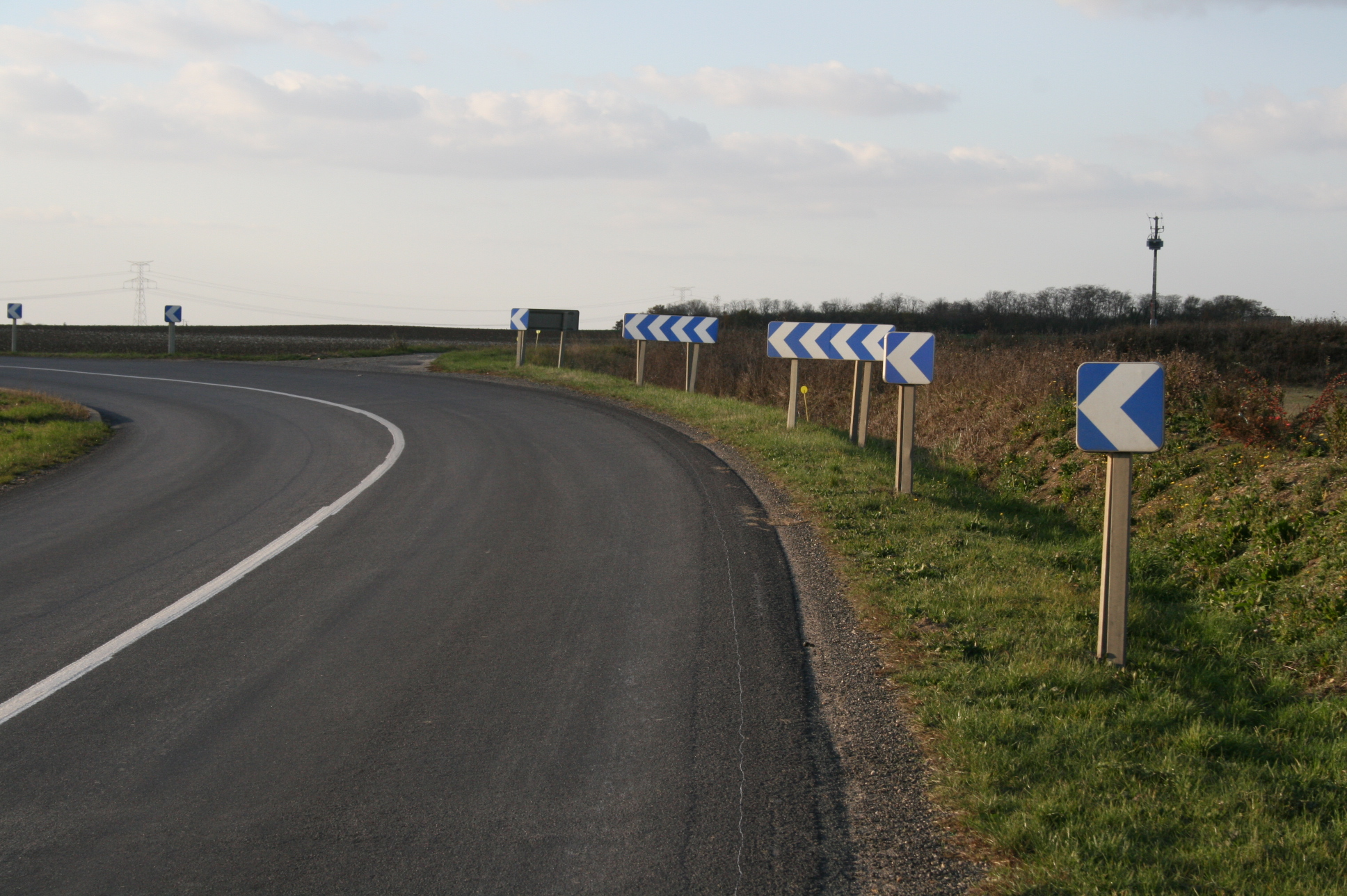 Balises J4 multiples en virage (France)